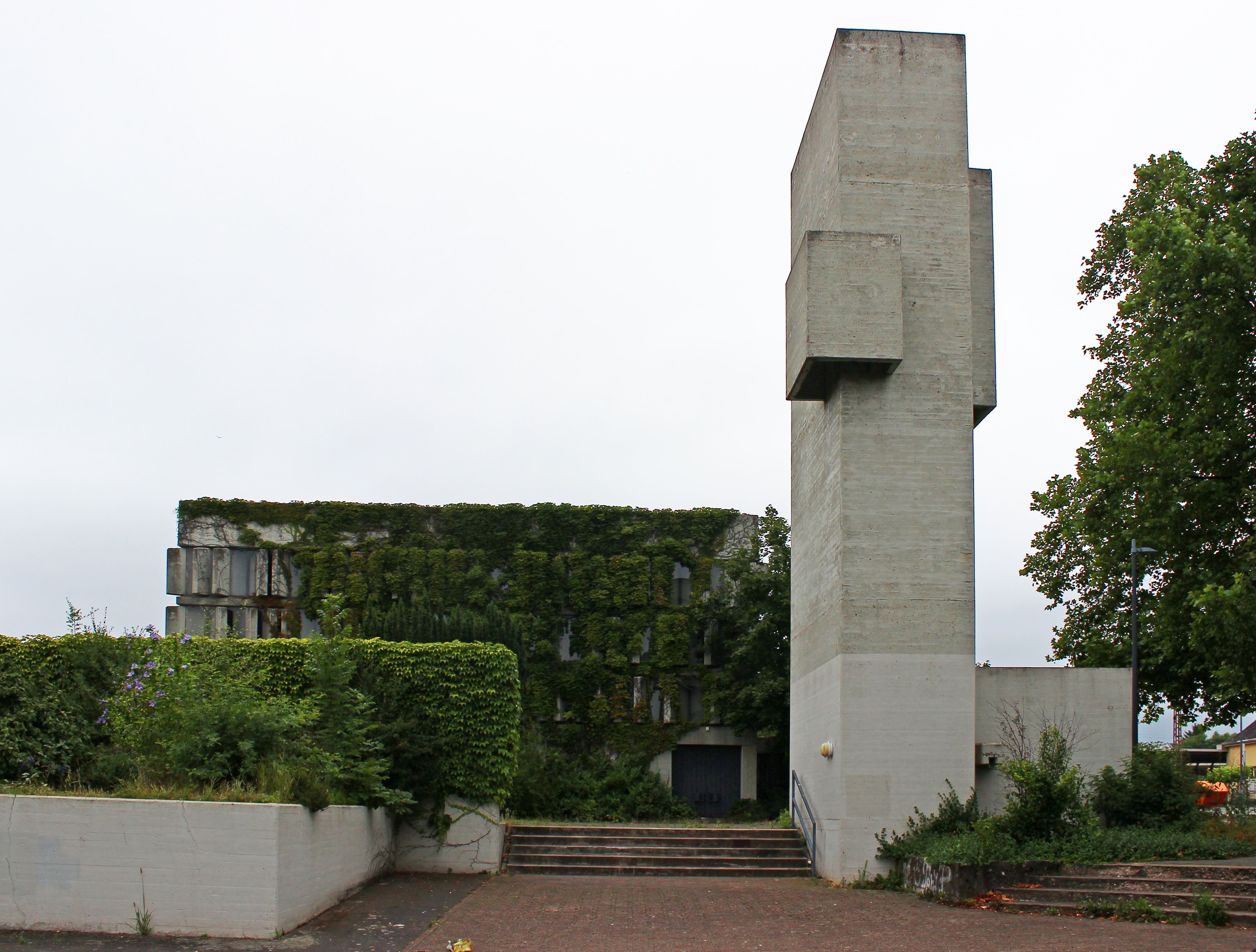 Kath. Kirche Christkönig in Saarlouis-Roden, Saarland